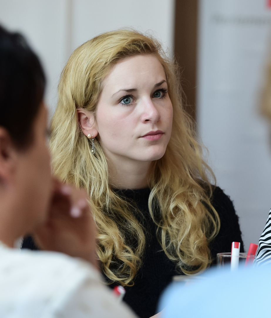 Tagung Brauchen Frauen mehr Stadt am Land?